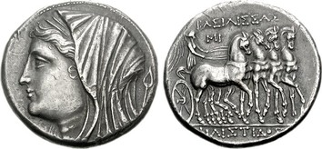 Tetradracma con la testa di Filistide